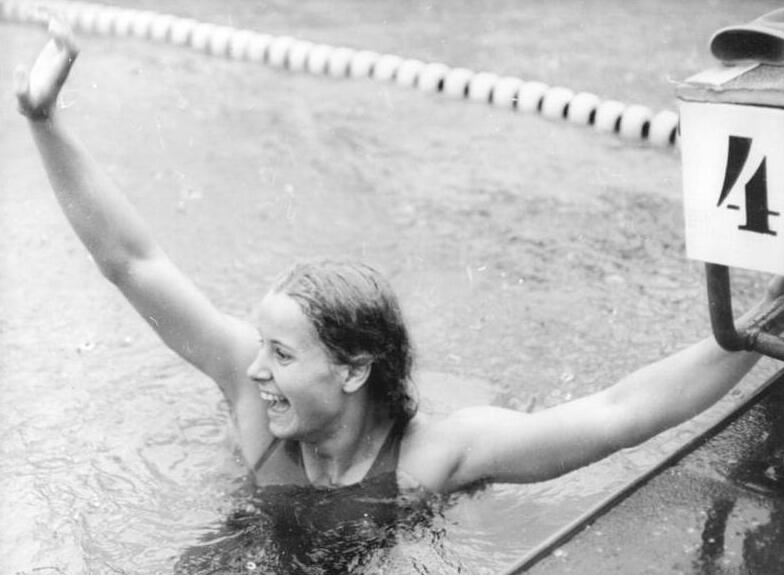 Kornelia Ender ADN-ZB Mittelstädt 13-7-73 Berlin: Kornelia Ender schwamm Weltrekord-Mit einem Weltrekord begannen bei wolkenbruchartigen Regen die Entscheidungen des dritten Tages der 24.DDR-Schwimmeisterschaften. Kornelia Ender (SC Chemie Halle) stellte über 100 m Freistil in 58,25 s einen Weltrekord auf, mit dem sie die bisherige Bestmarke von Shane Gould (Australien) um drei Zehntel unterbot. Hier jubelt die 14jährige Hallenserin den Zuschauern zu.